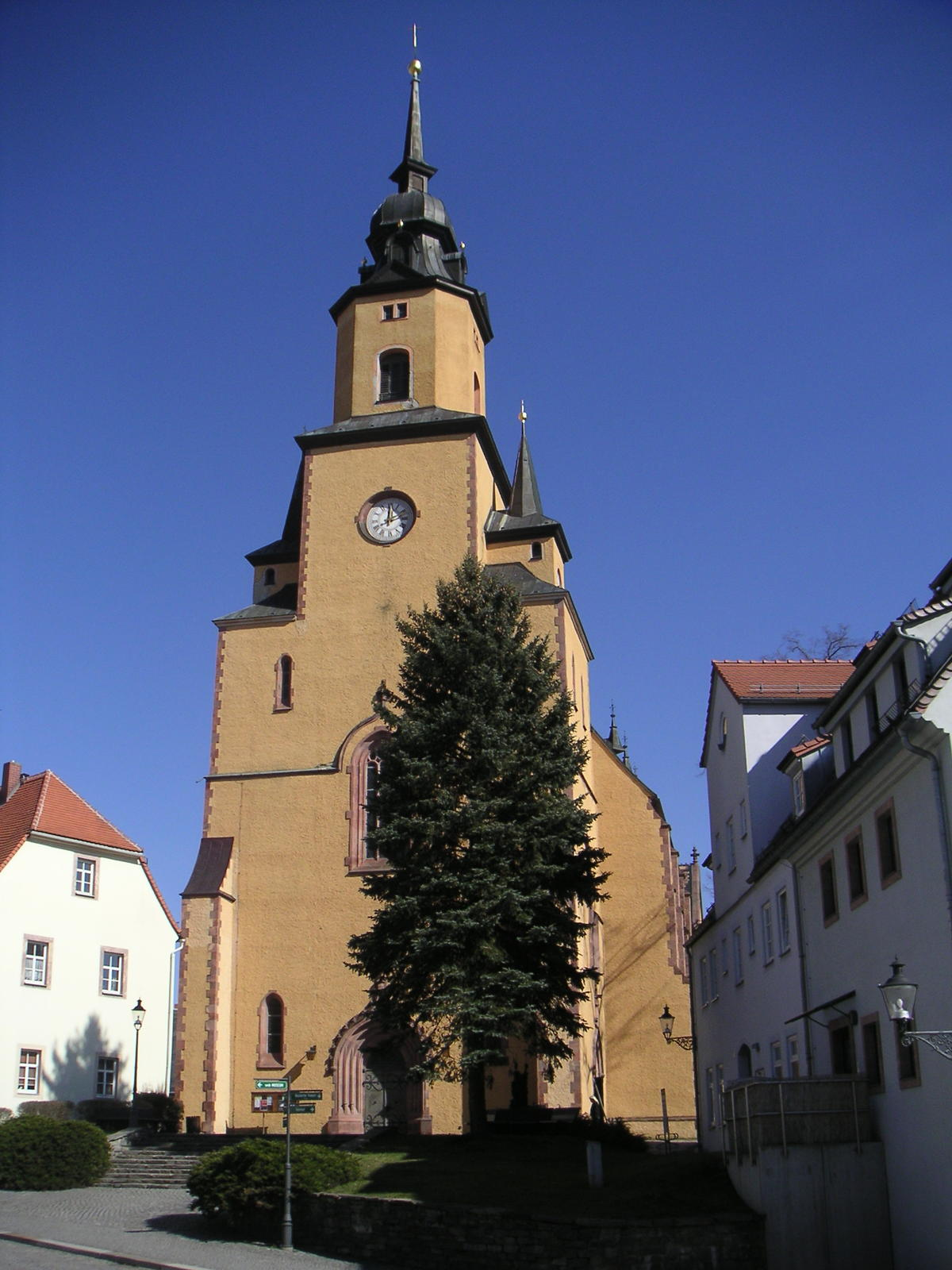 Kirche Oederan, Turm- bzw. Westseite